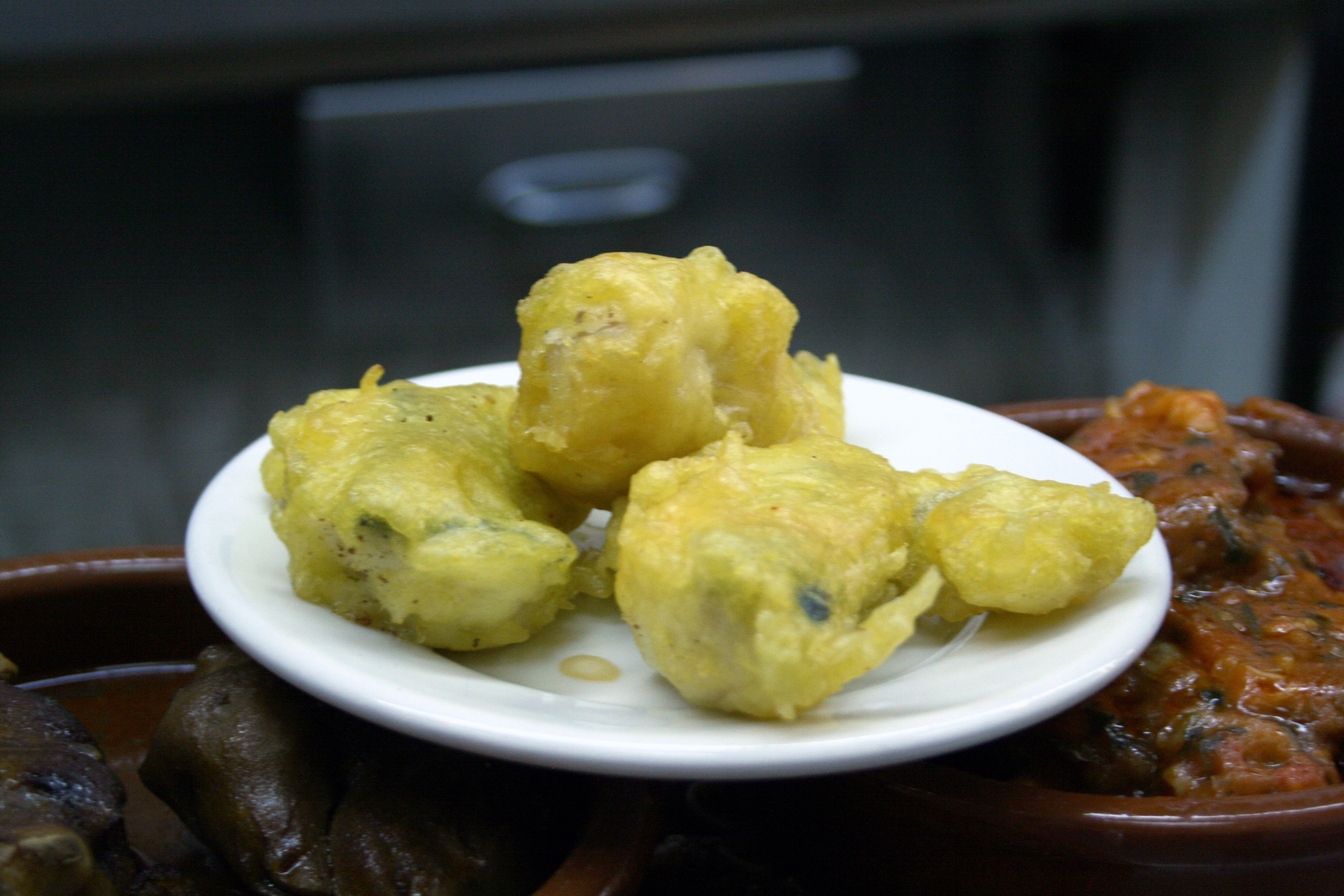 Bacalao rebozado - A falta de un pimiento rojo para ser un "soldadito de pavia"